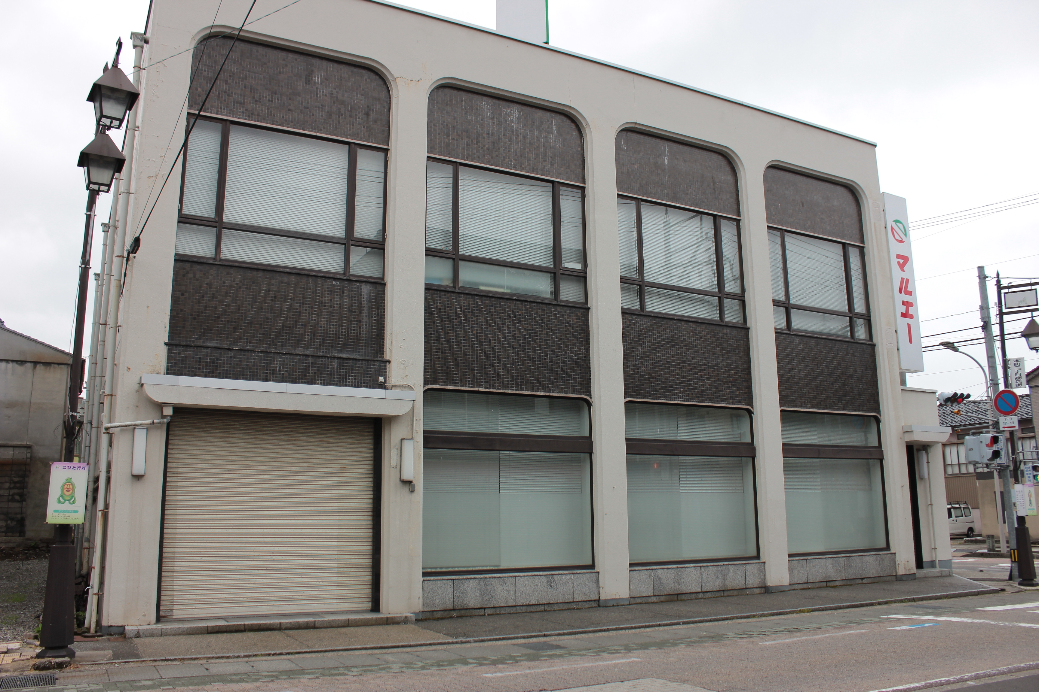 石川県を地盤とするスーパーマーケット、マルエー本部（石川県白山市） Canon EOS Kiss X5